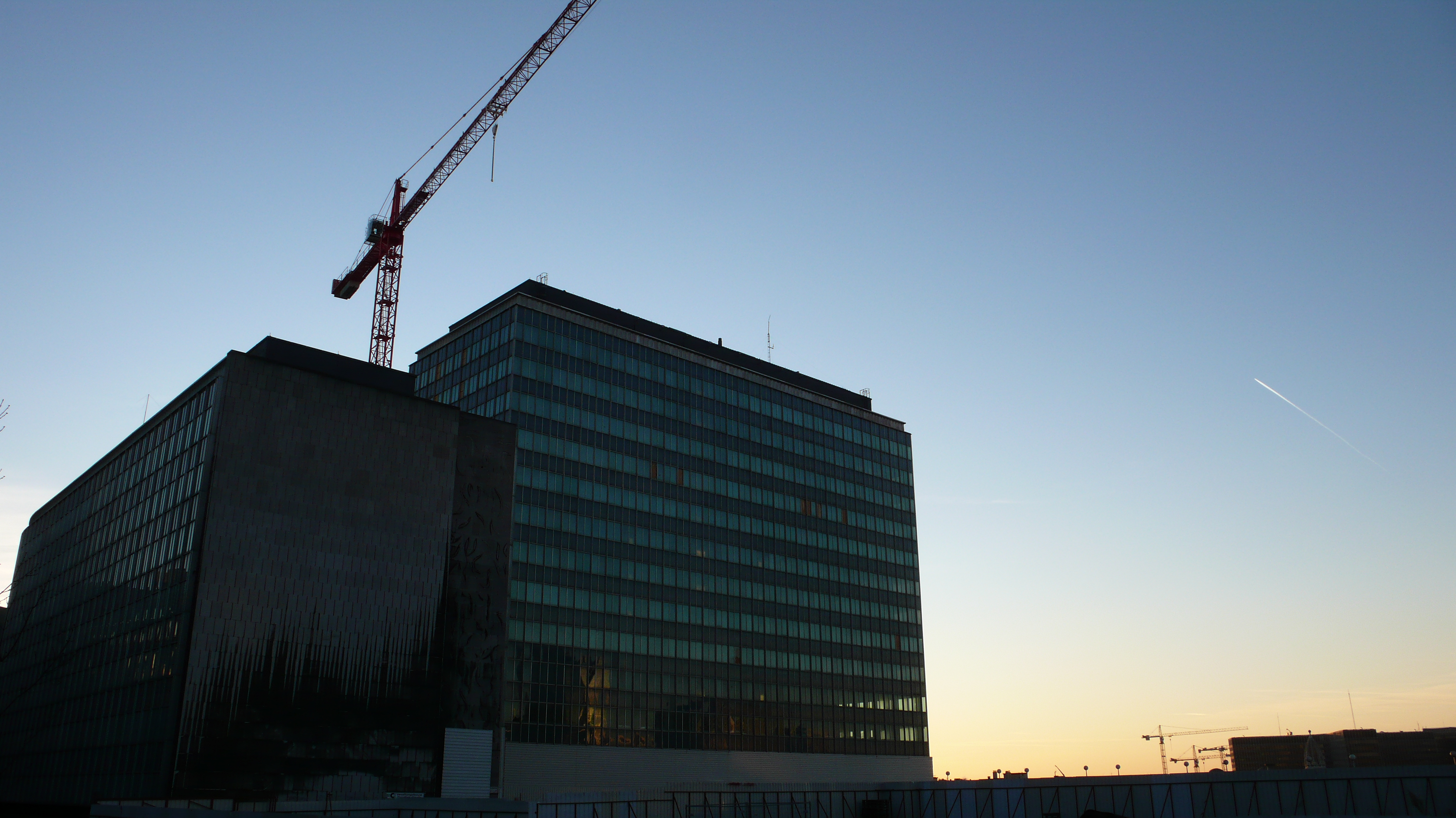 Coucher de soleil sur les quartiers Esplanade et Vésale